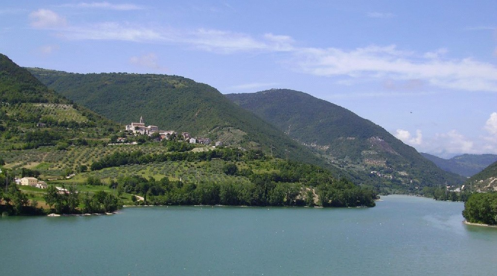 Vista panoramica del Castello di Pievefavera, Caldarola